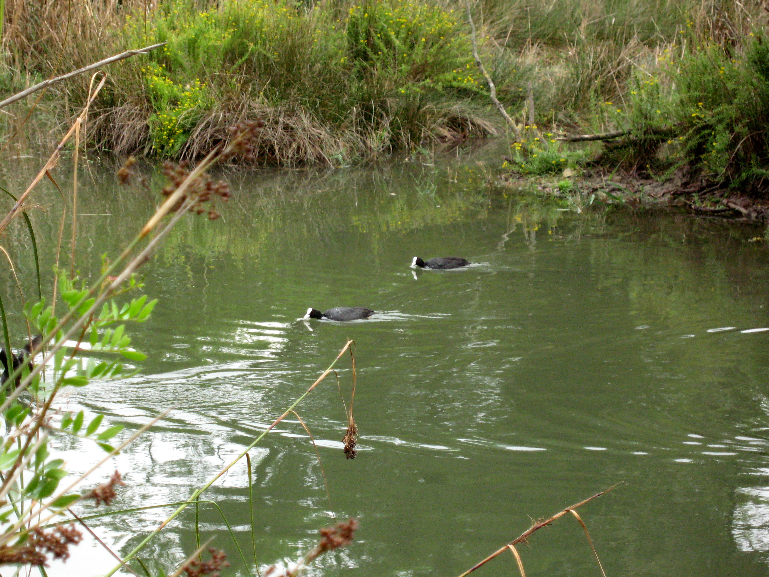 Parc natural de s’Albufera de Mallorca, Gemeinde Muro, Mallorca, Spanien